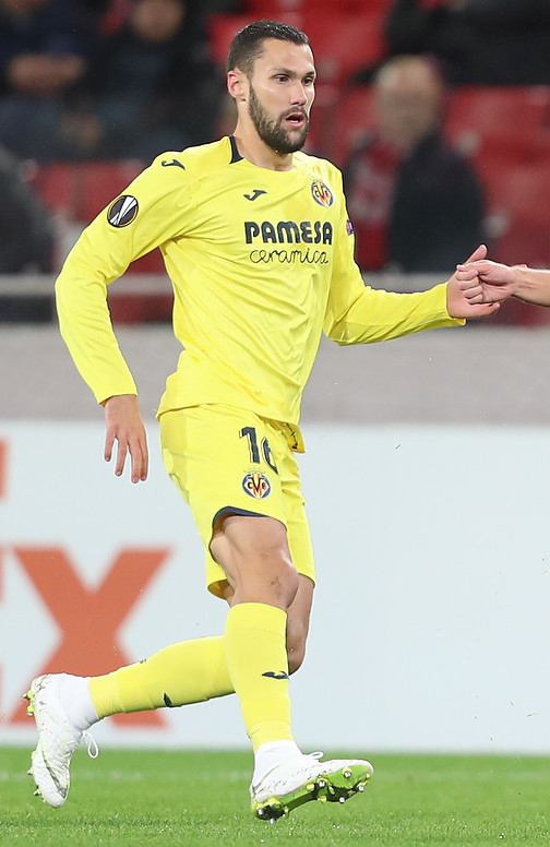 Битва на «Открытие-Арене». «Спартак» поделил очки с «Вильярреалом»